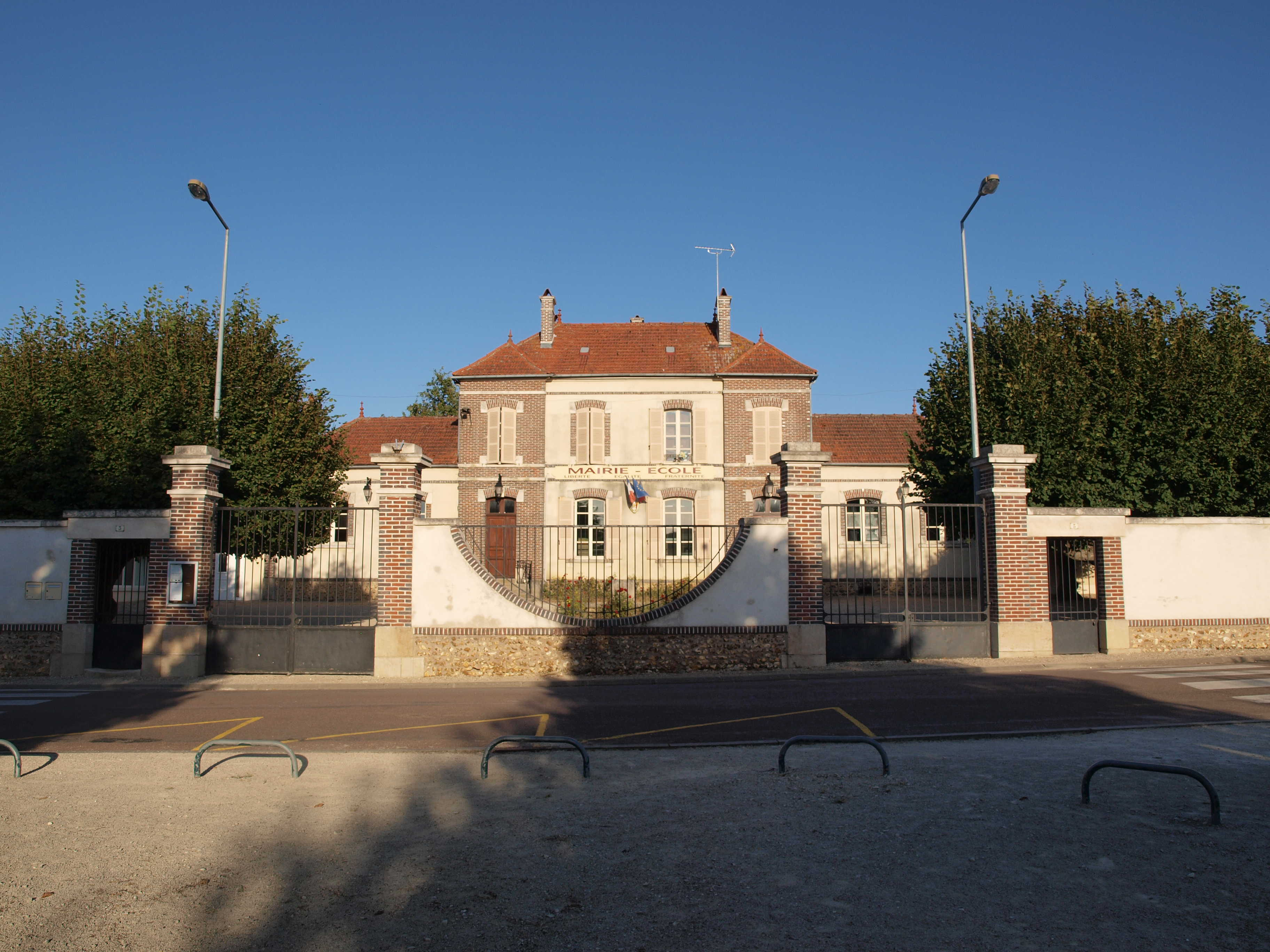 Béon (Yonne, France) ; Mairie-école.